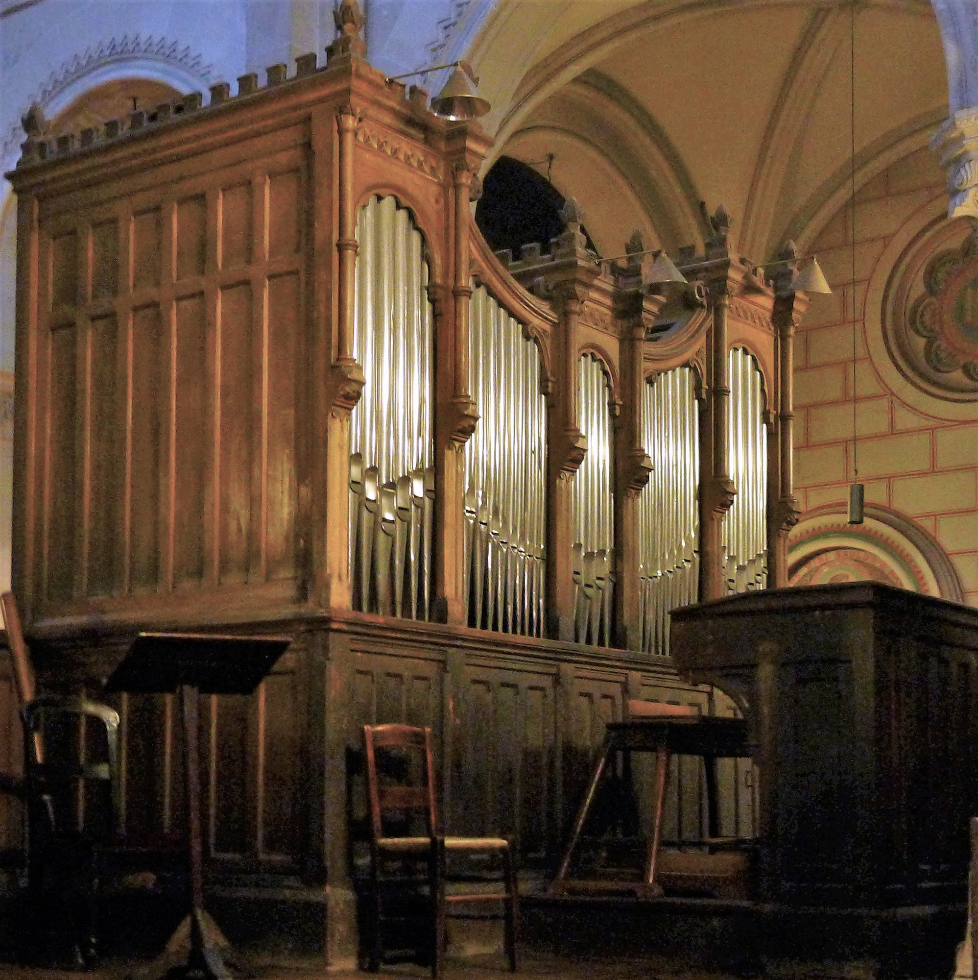 Église Saint-Ambroise (orgue de choeur) - Paris XI